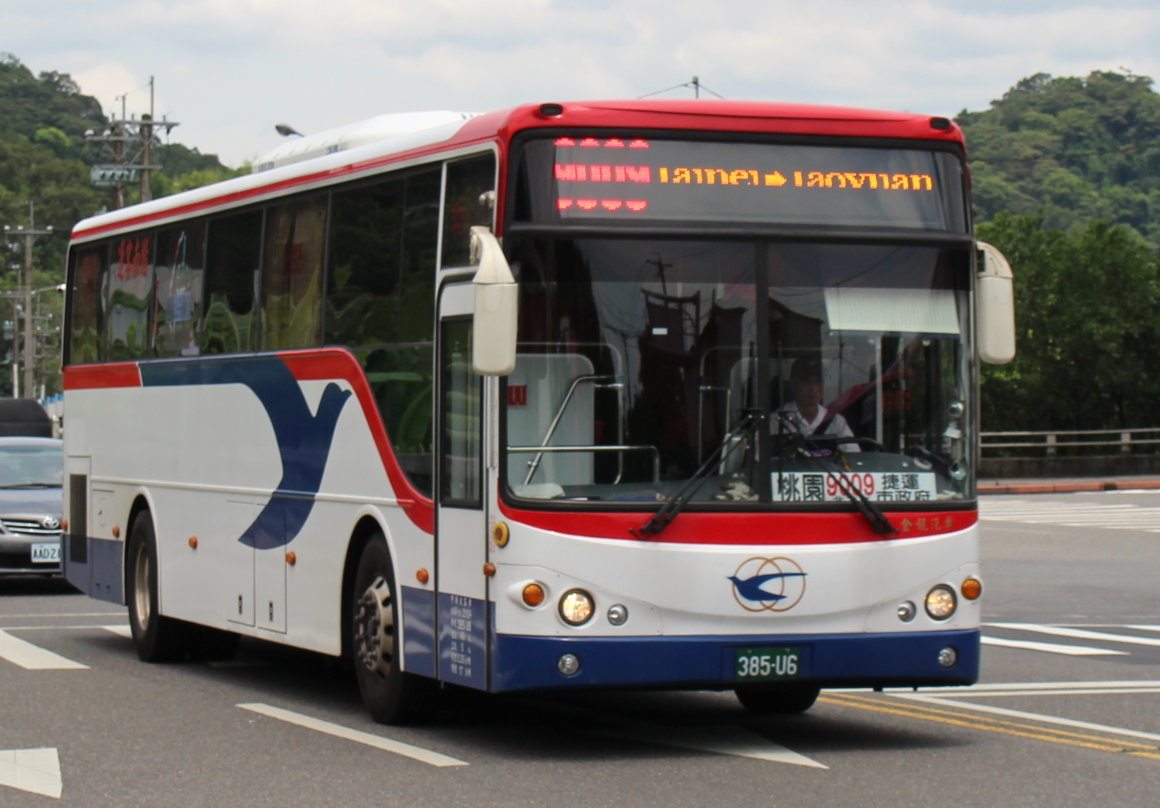 指南客運金龍單門高巴 9009回送車 385-U6